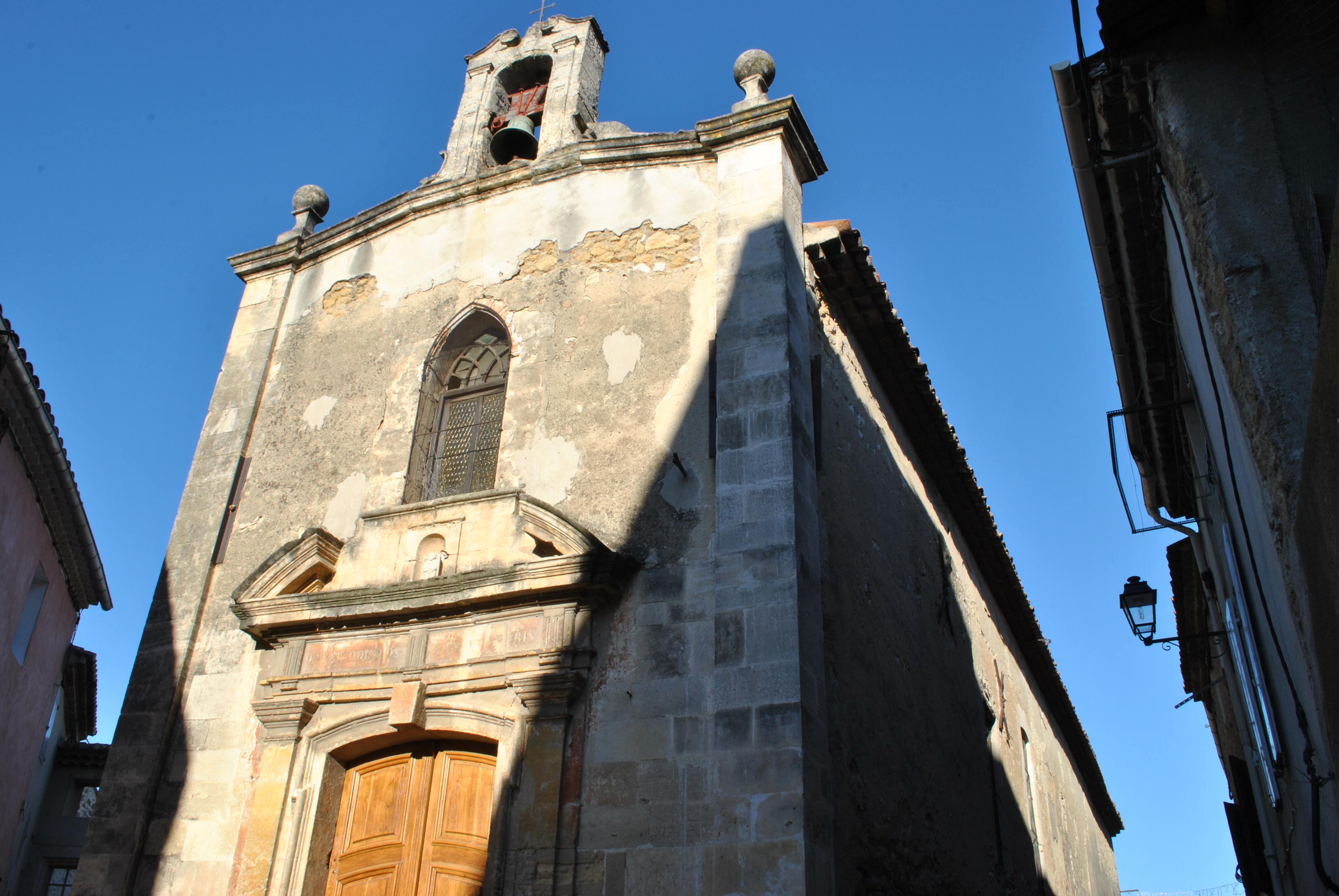 Chapelle des pénitents, sur la D71, la rue qui relie la rue Pierre Curie et la rue Frédéric Mistral, Alleins 13980, Bouches-du-Rhône (France).